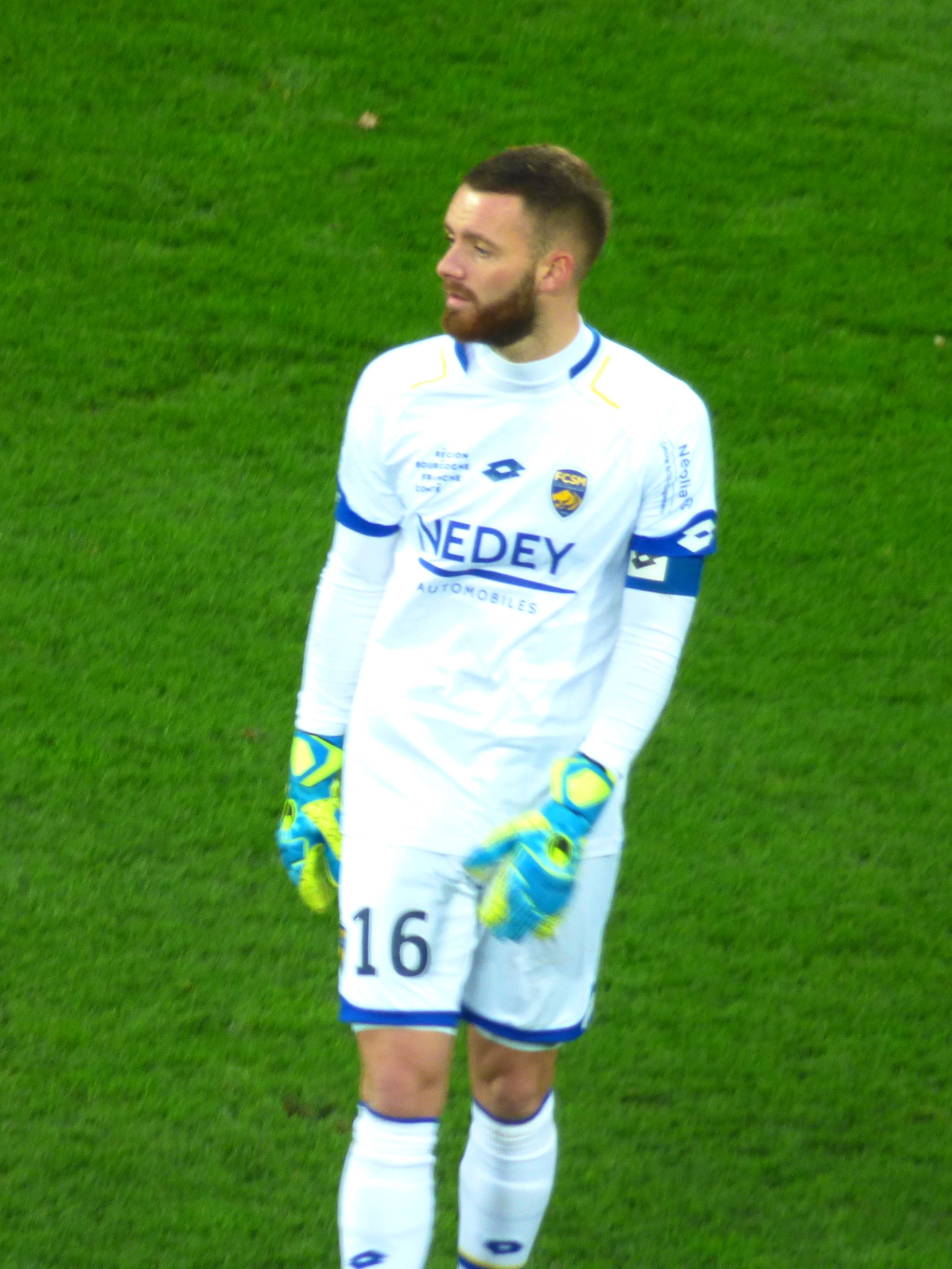 Maxence Prévot lors du match RC Lens / FC Sochaux, comptant pour la quinzième journée du championnat de France de Ligue 2 de football 2019-2020, le 23 novembre 2019, au Stade Bollaert-Delelis.